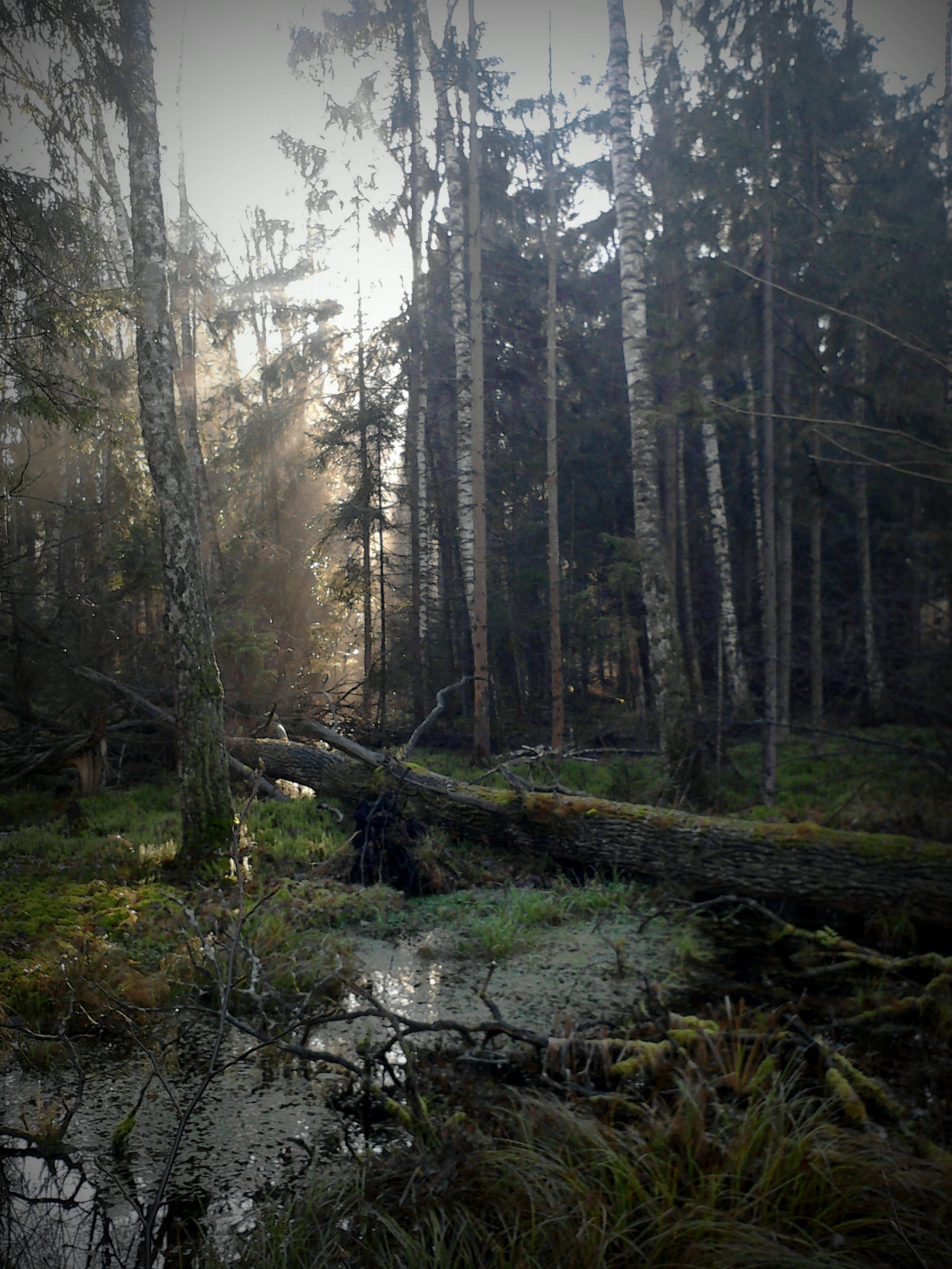 Autor: Adrian Grzegorz 25.11.2012